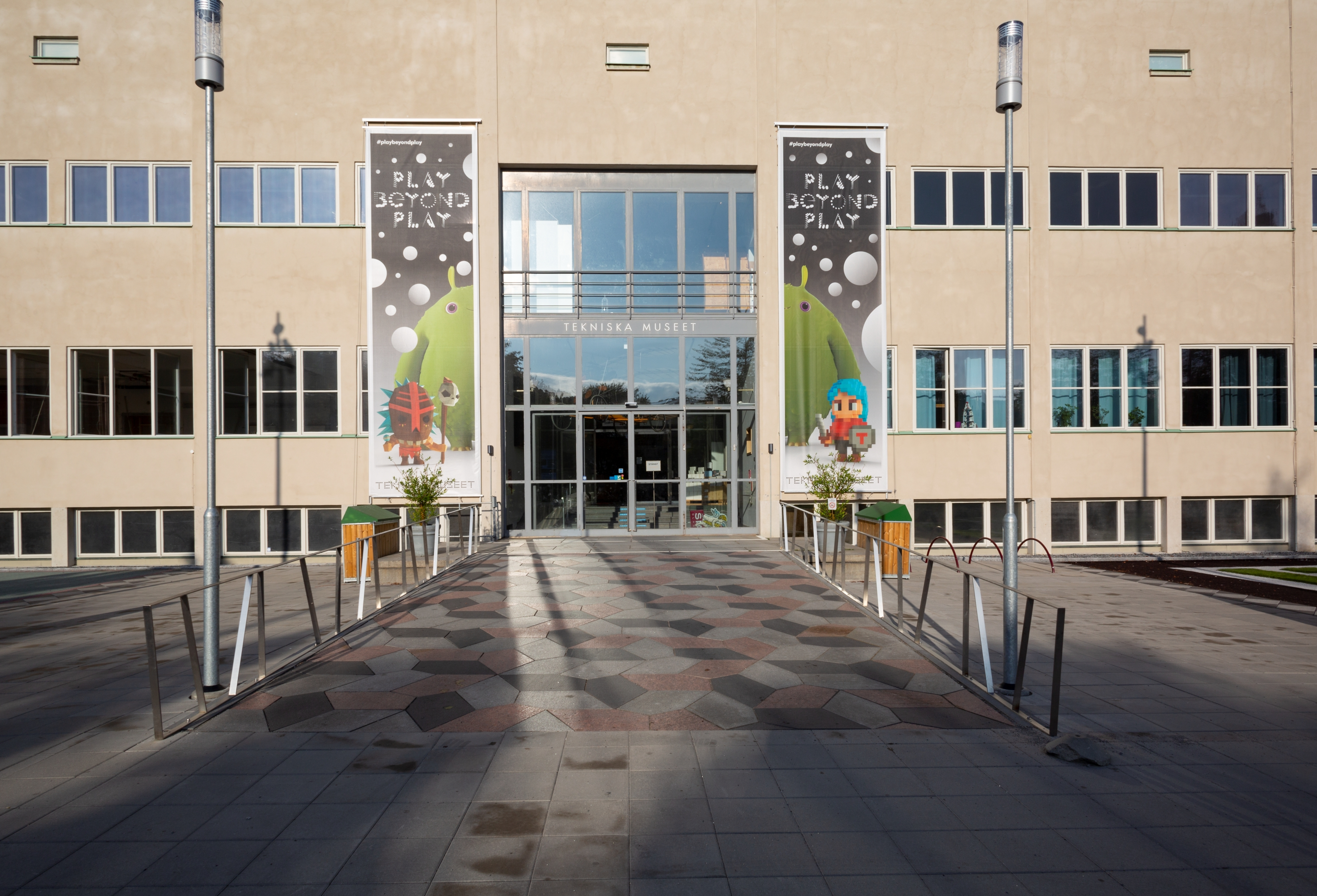 Exteriör av Tekniska museets huvudentré.